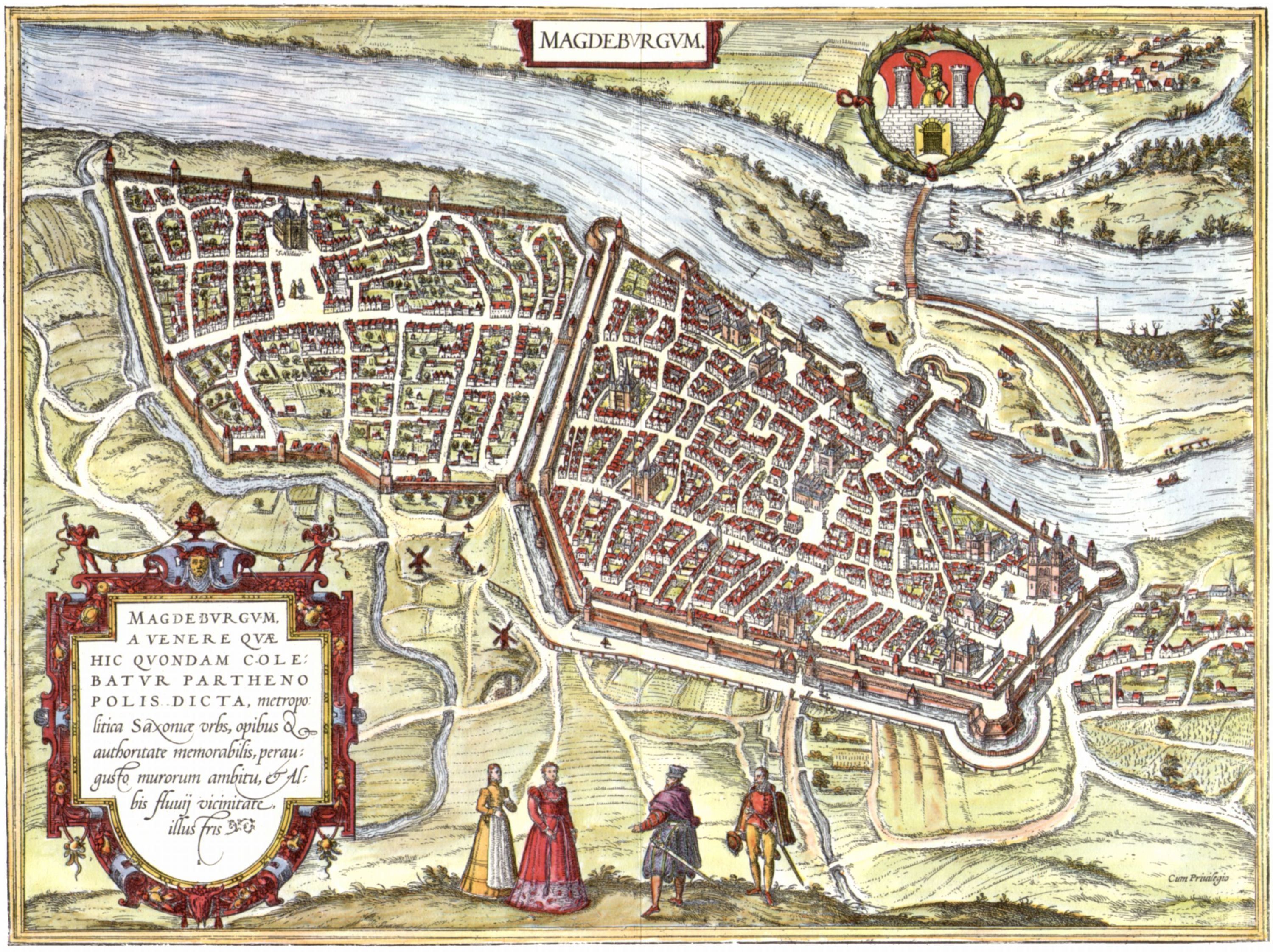 Gesamtansicht von Magdeburg um 1572, kolorierter Kupferstich